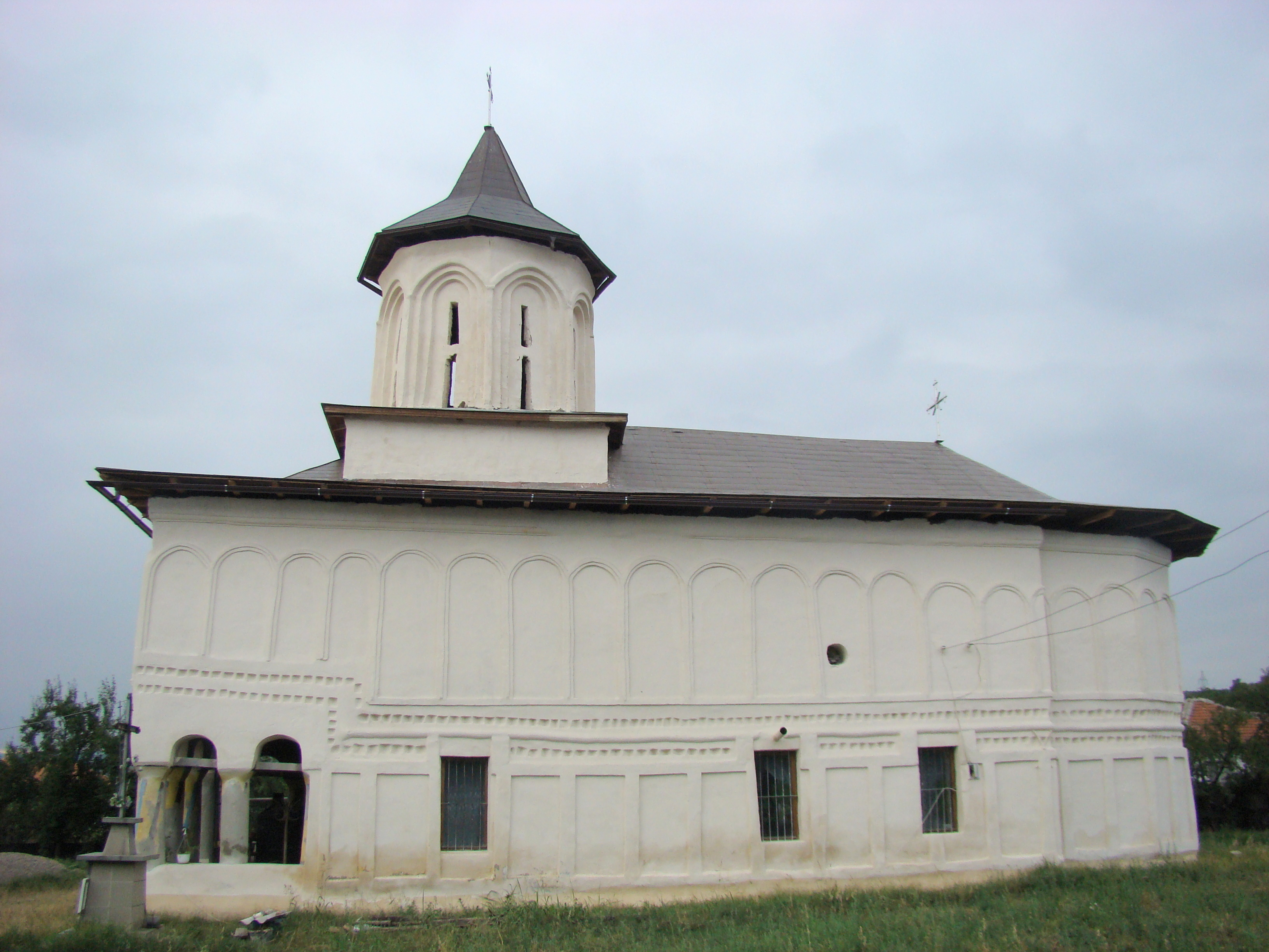 Biserica „Adormirea Maicii Domnului și Sf. Dumitru”, sat Cerneți; comuna Șimian (În fostul sat înglobat Piatra Albă)